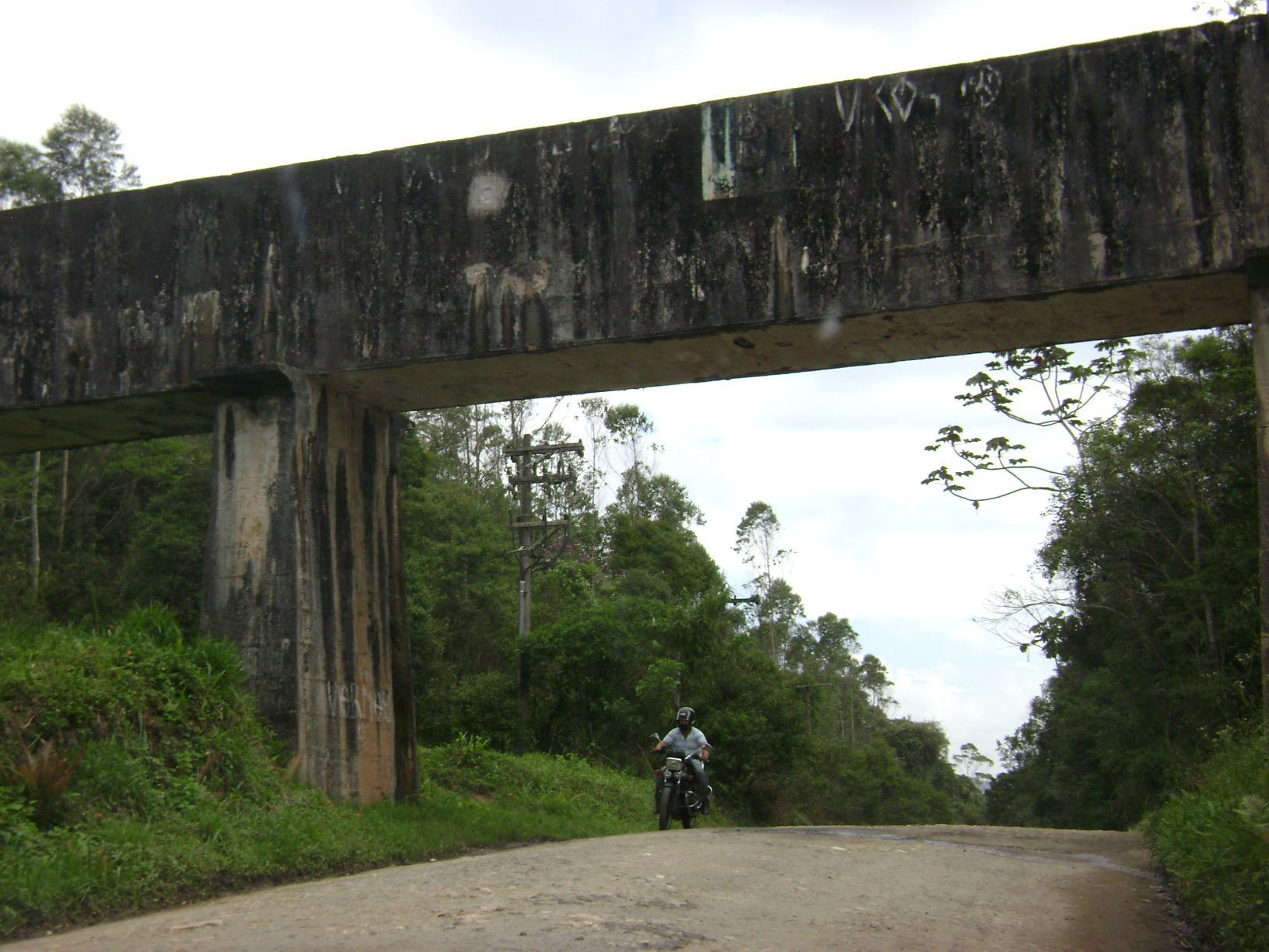 Rodovia SP-102 sob o Aqueduto da Sabesp no Distrito de Taiaçupeba, em Mogi das Cruzes/SP.